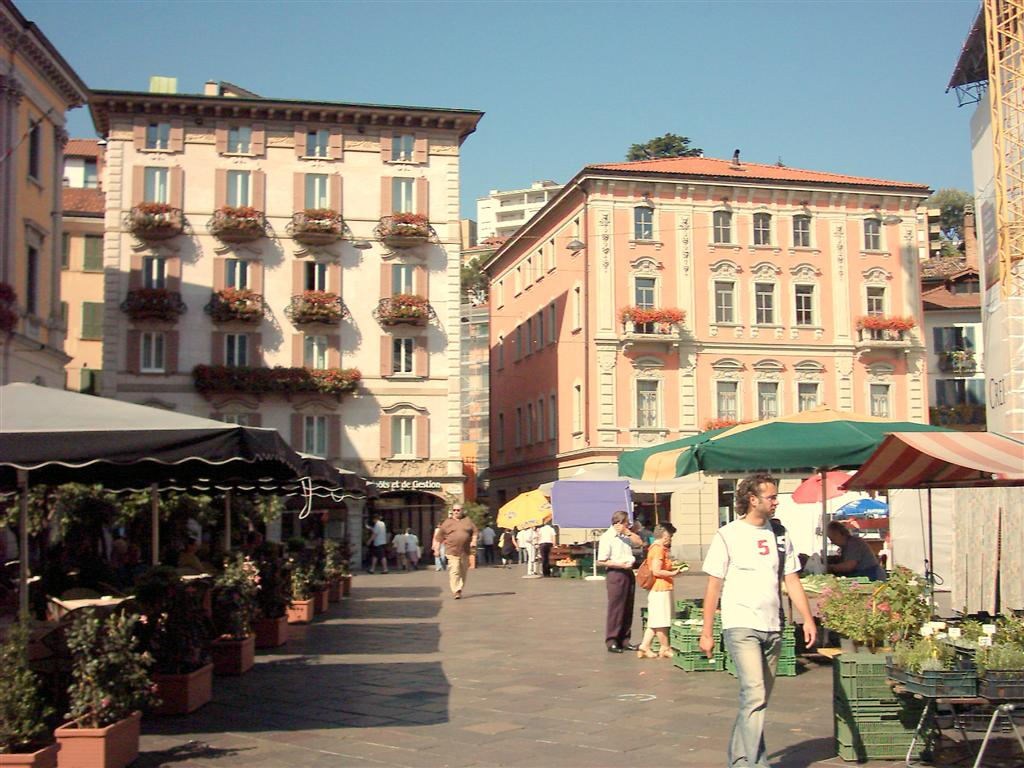 Afbeelding is vrij van auteursrechten, en dus vrij te gebruiken.